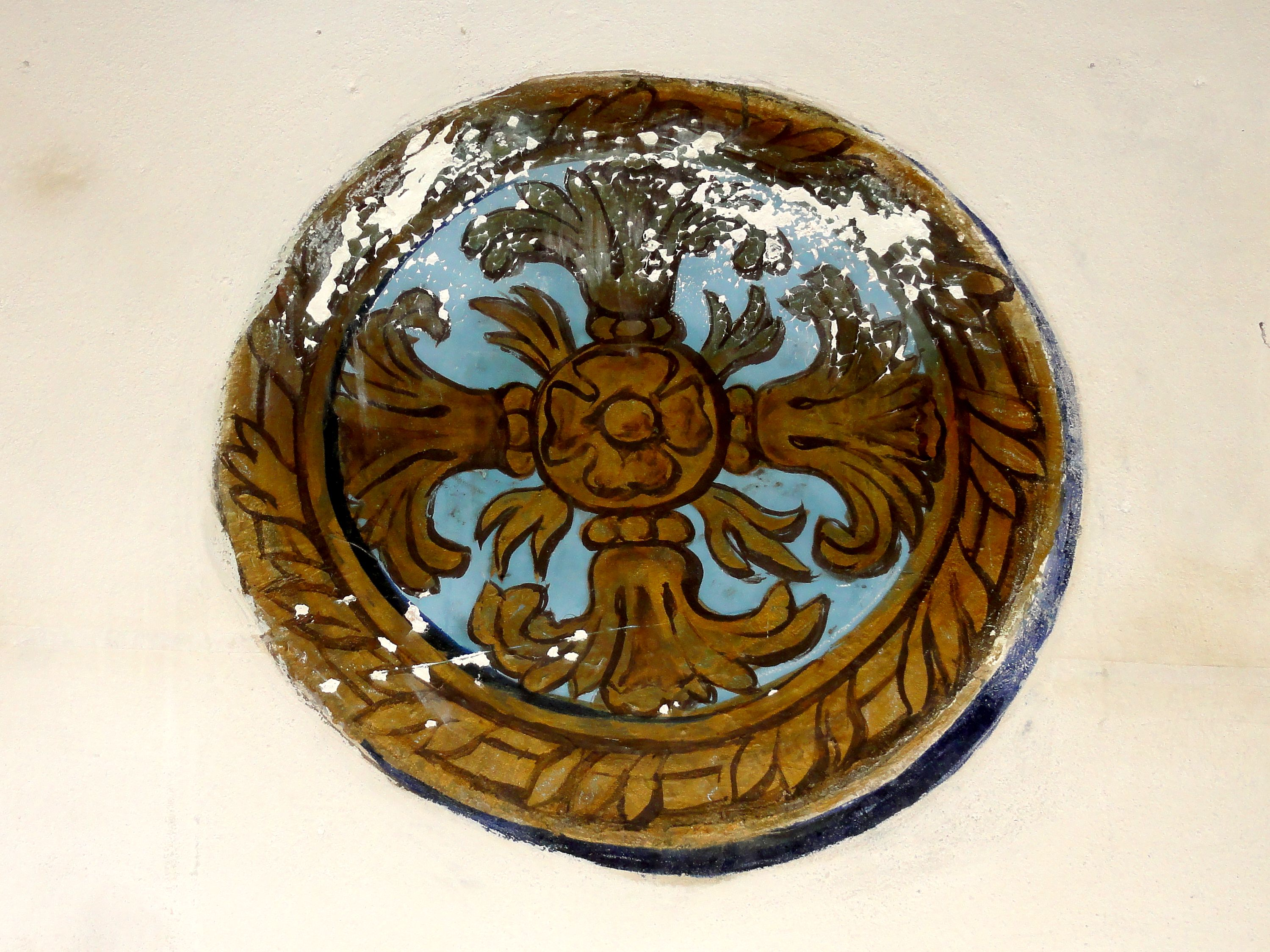 Décor peint dans le chœur.